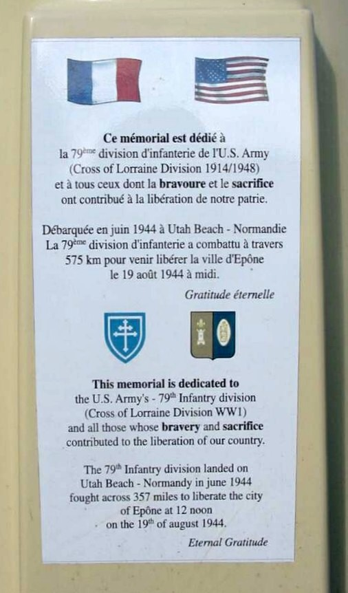 Borne de la liberté (plaque commémorative) à Épône, Yvelines (France)